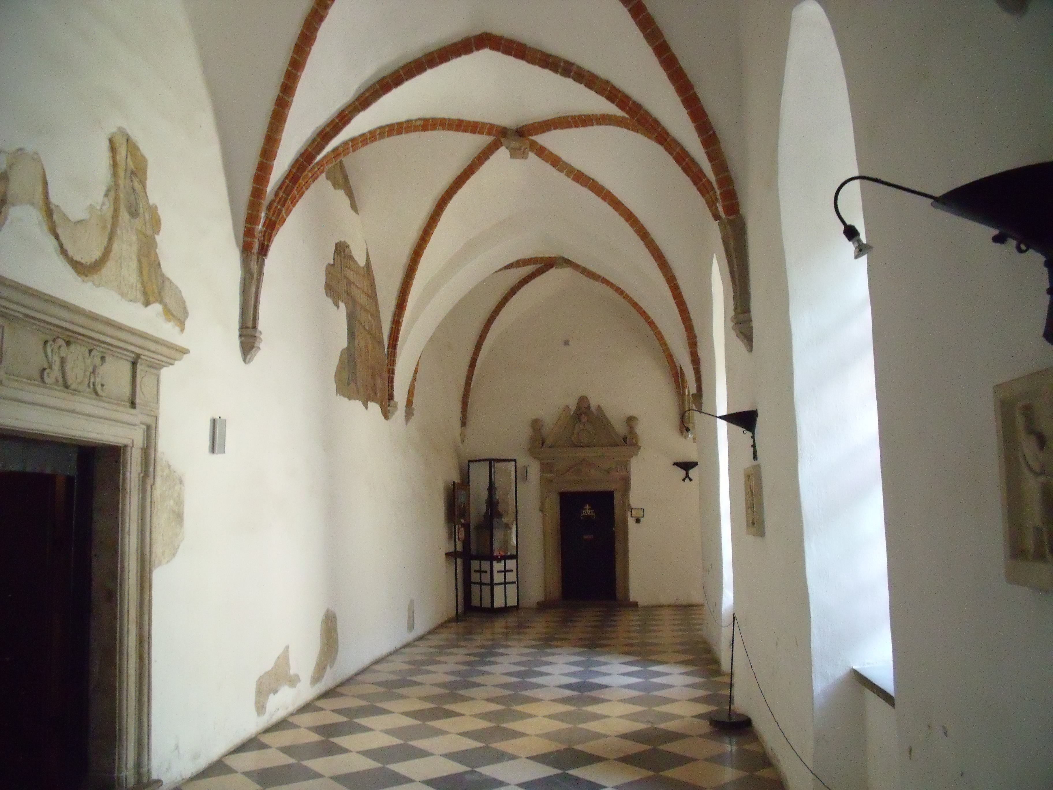 Krużganek.